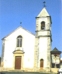 Igreja Matriz de São João Baptista, no Cartaxo, Portugal.